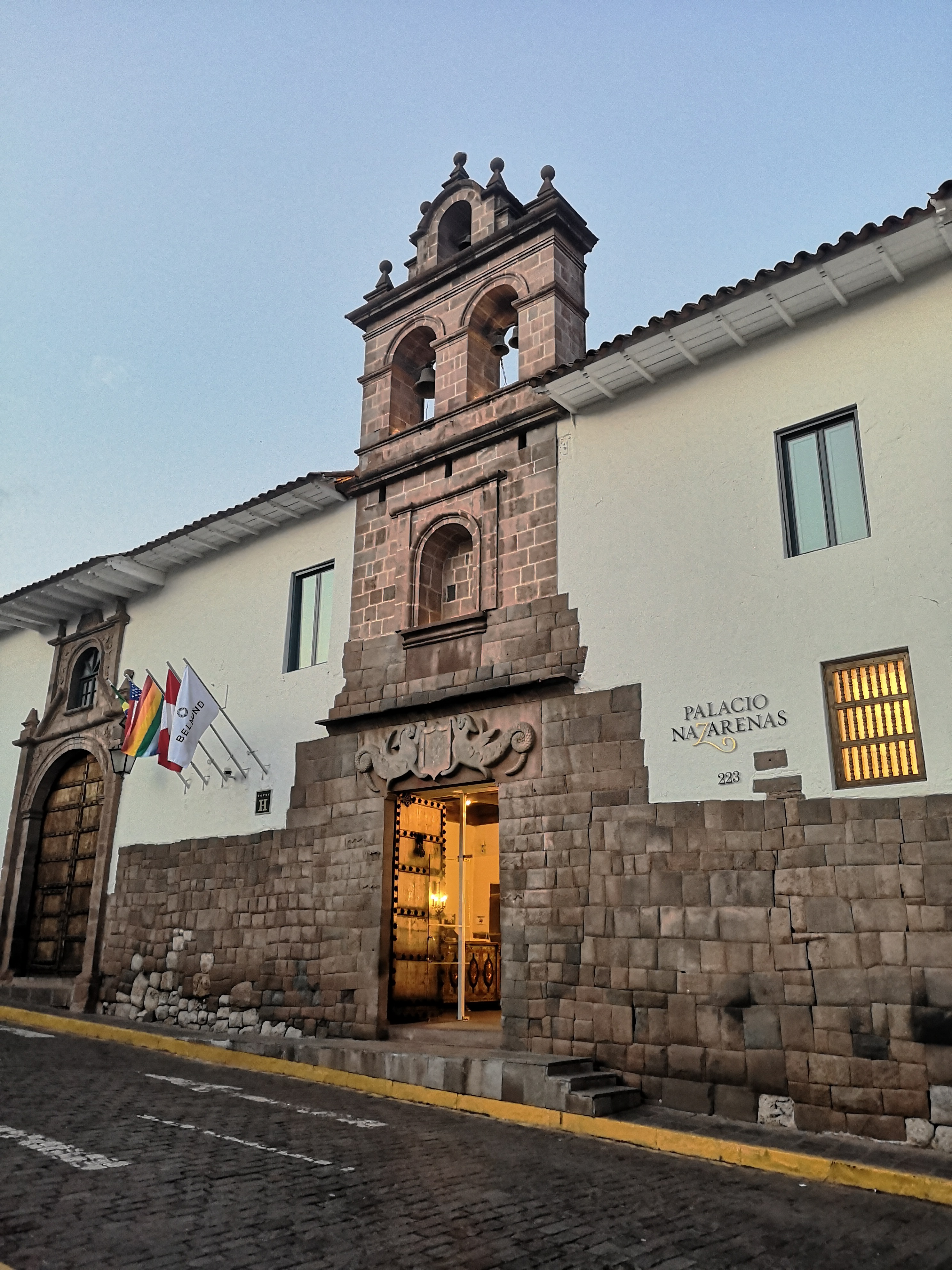 Puerta del antiguo local del monasterio de las Nazarenas en el Cusco, Perú